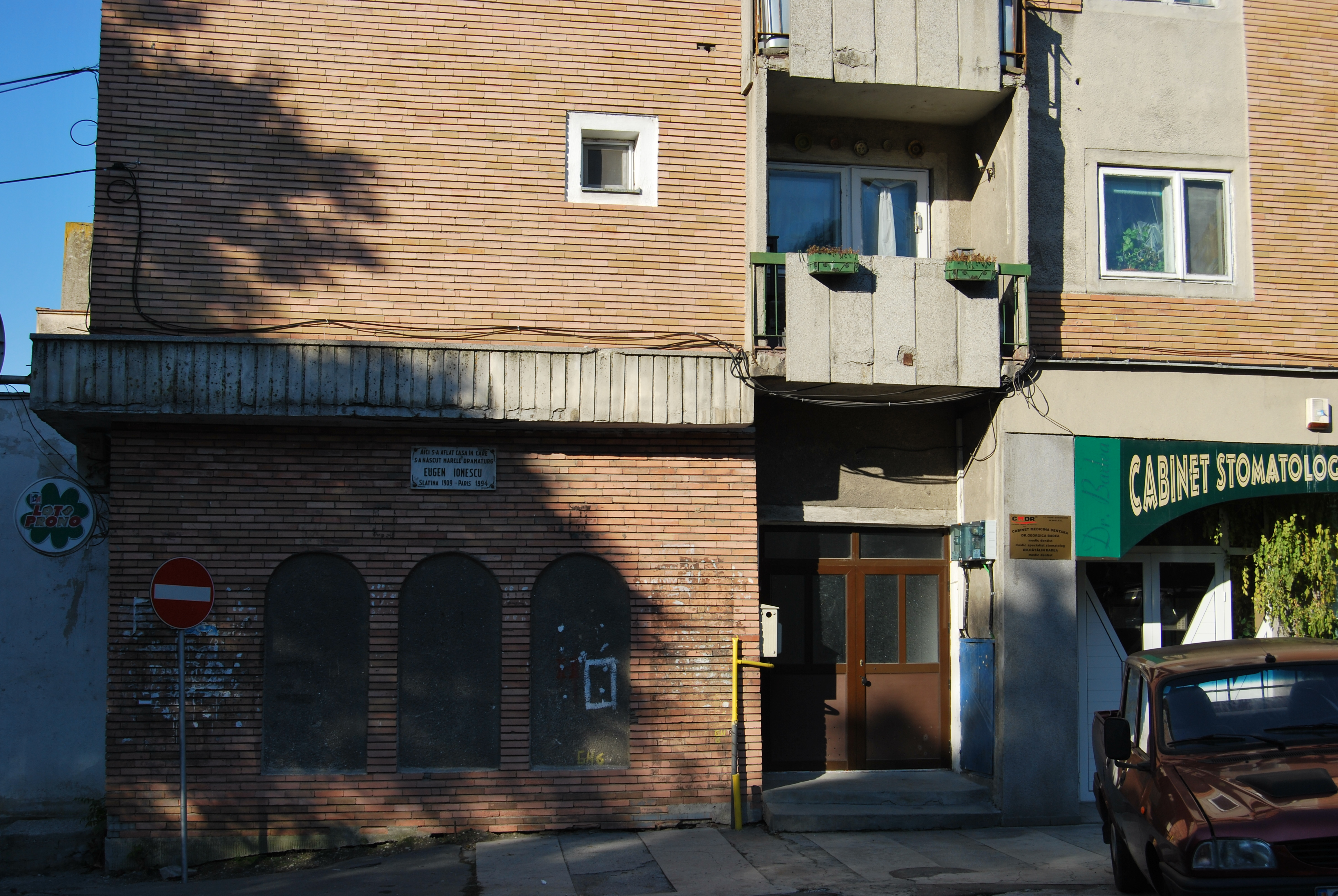 Pe locul în care s-a ridicat acest bloc de locuinţe s-a aflat casa în care s-a născut Eugen Ionescu